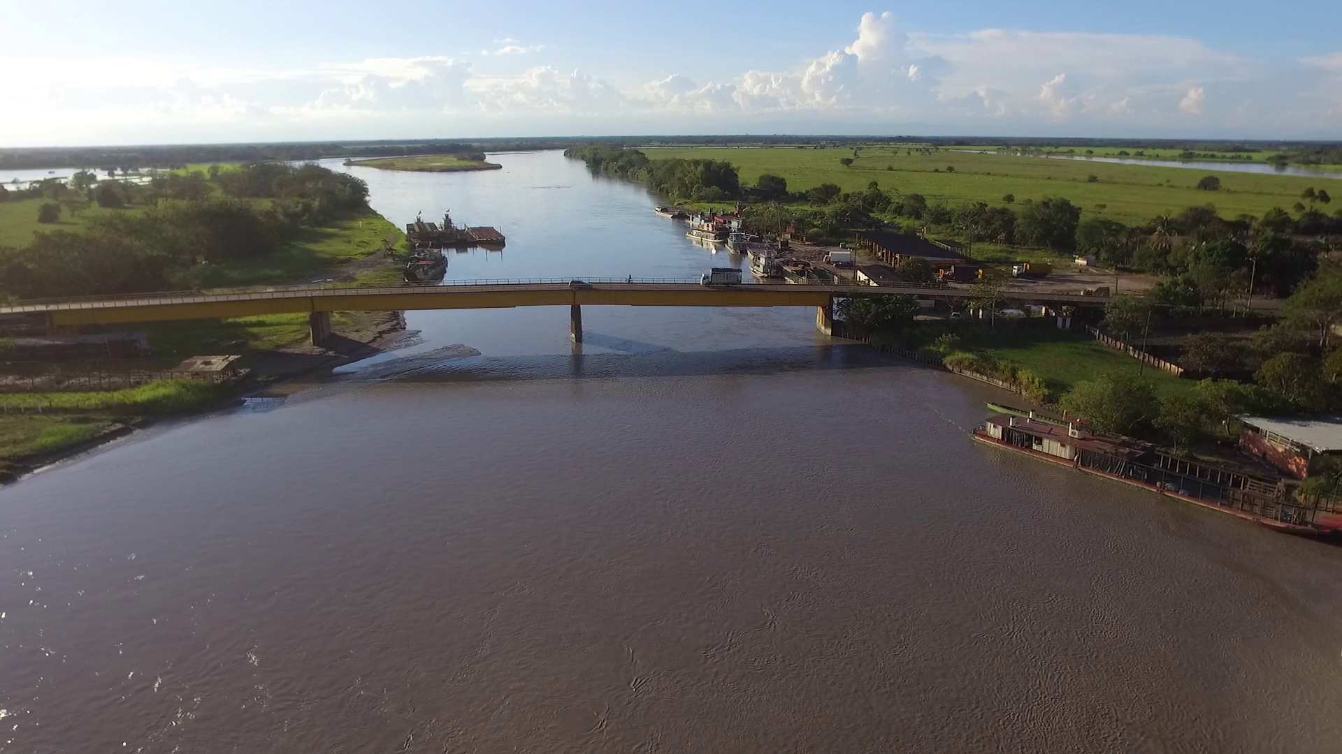 Fotografia aérea del puente carlos lleras restrepo